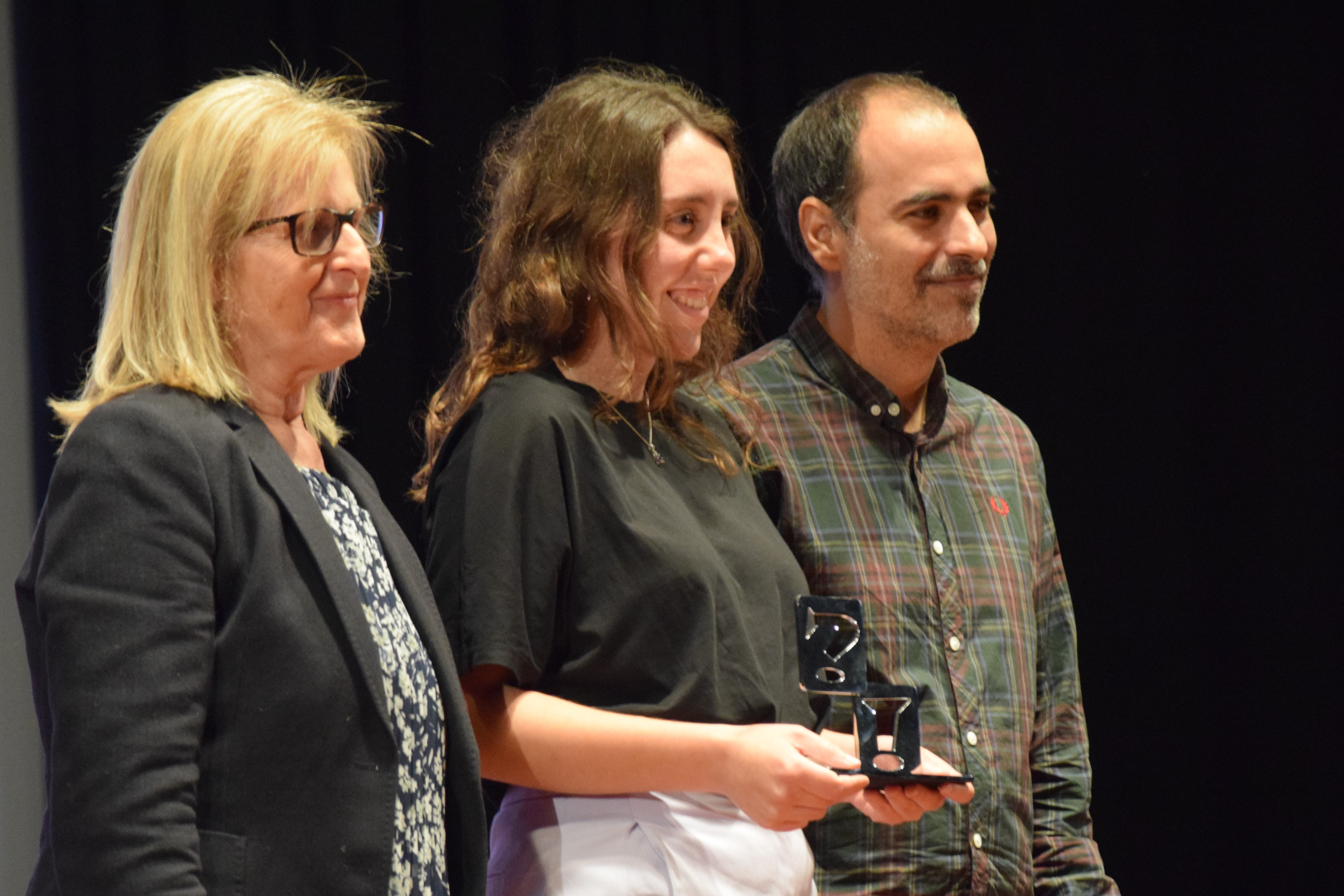 Rosa Laparra (Fundació Divina Pastora) amb l'autora de còmics María Medem, procamada autora revelació del 37. Còmic Barcelona per la novel·la gràfica Cénit (Apa Apa). 2019.